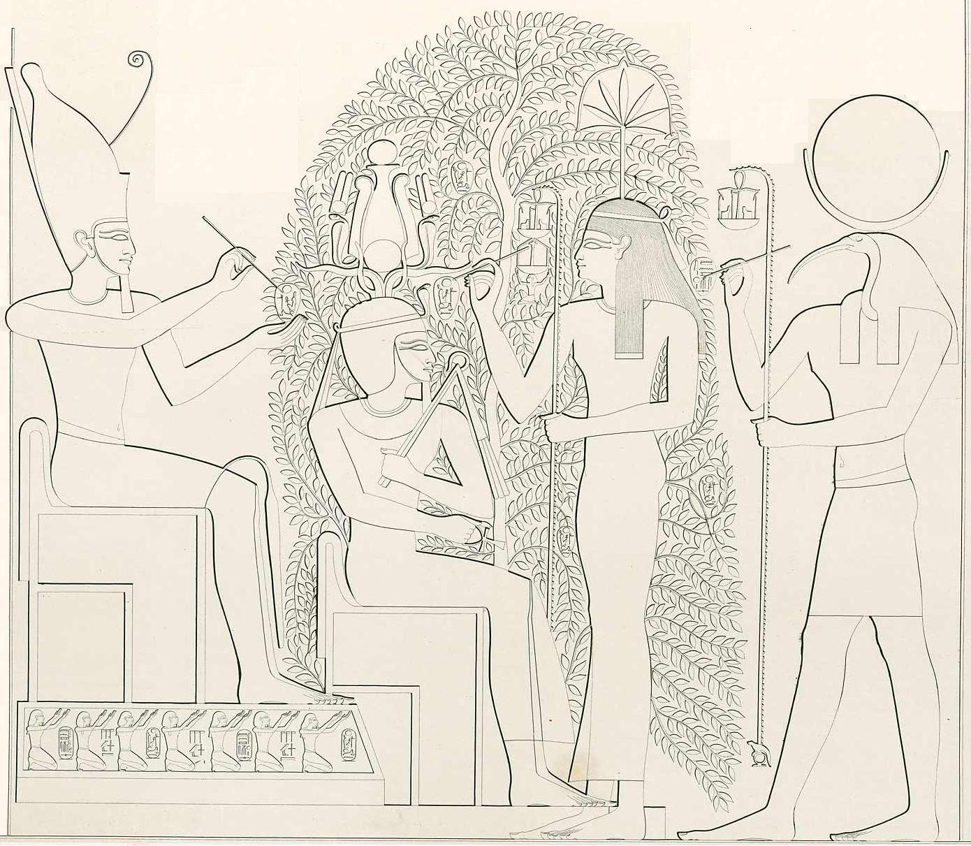 Ramesse II. pod stromem išed ve společnosti bohů obdarovávajících jej dlouhou vládou; Ramesseum